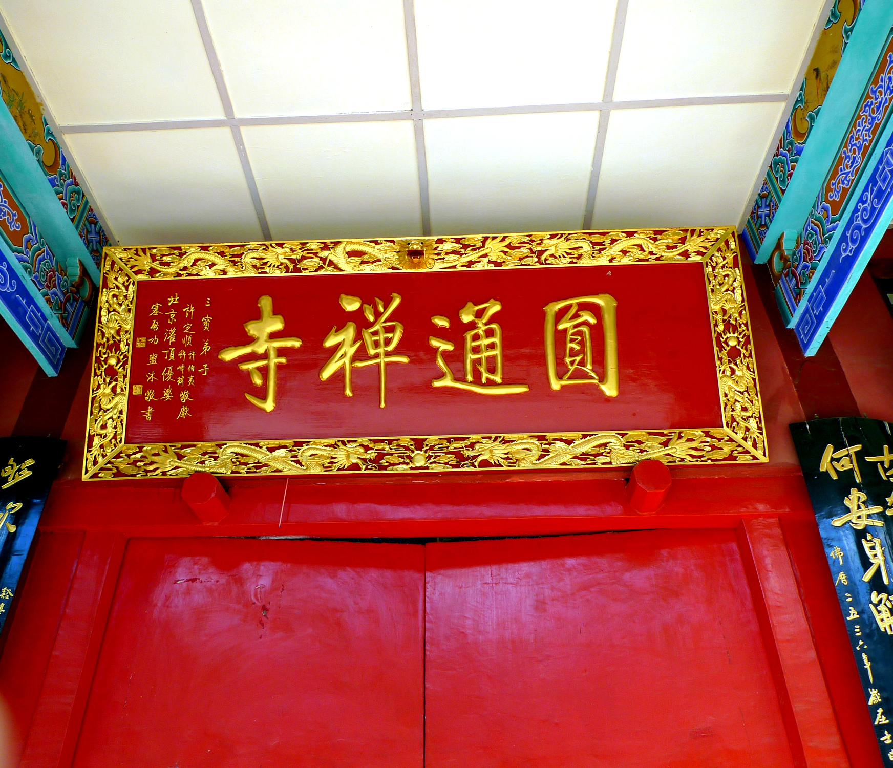 昆明圆通禅寺额匾